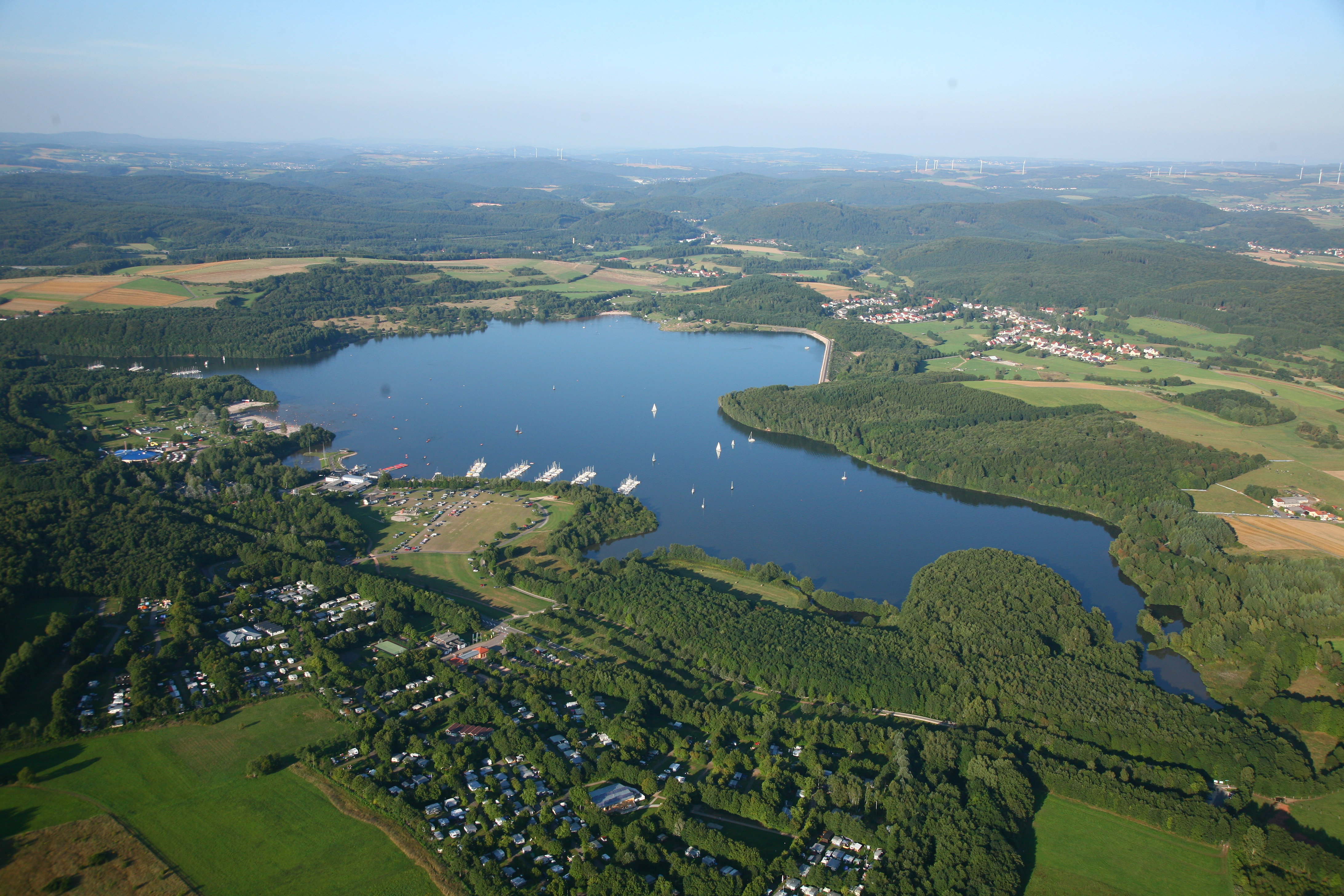 Luftaufnahme des Bostalsee